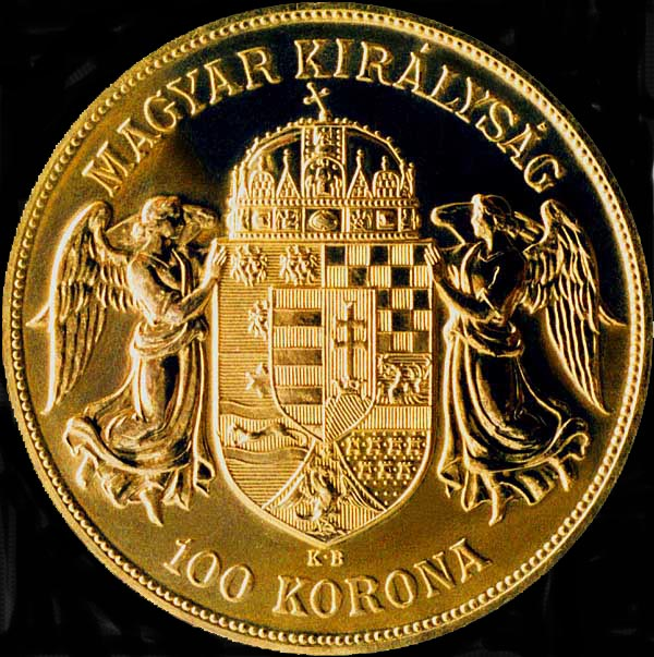 100 Korona 1908 - reverse